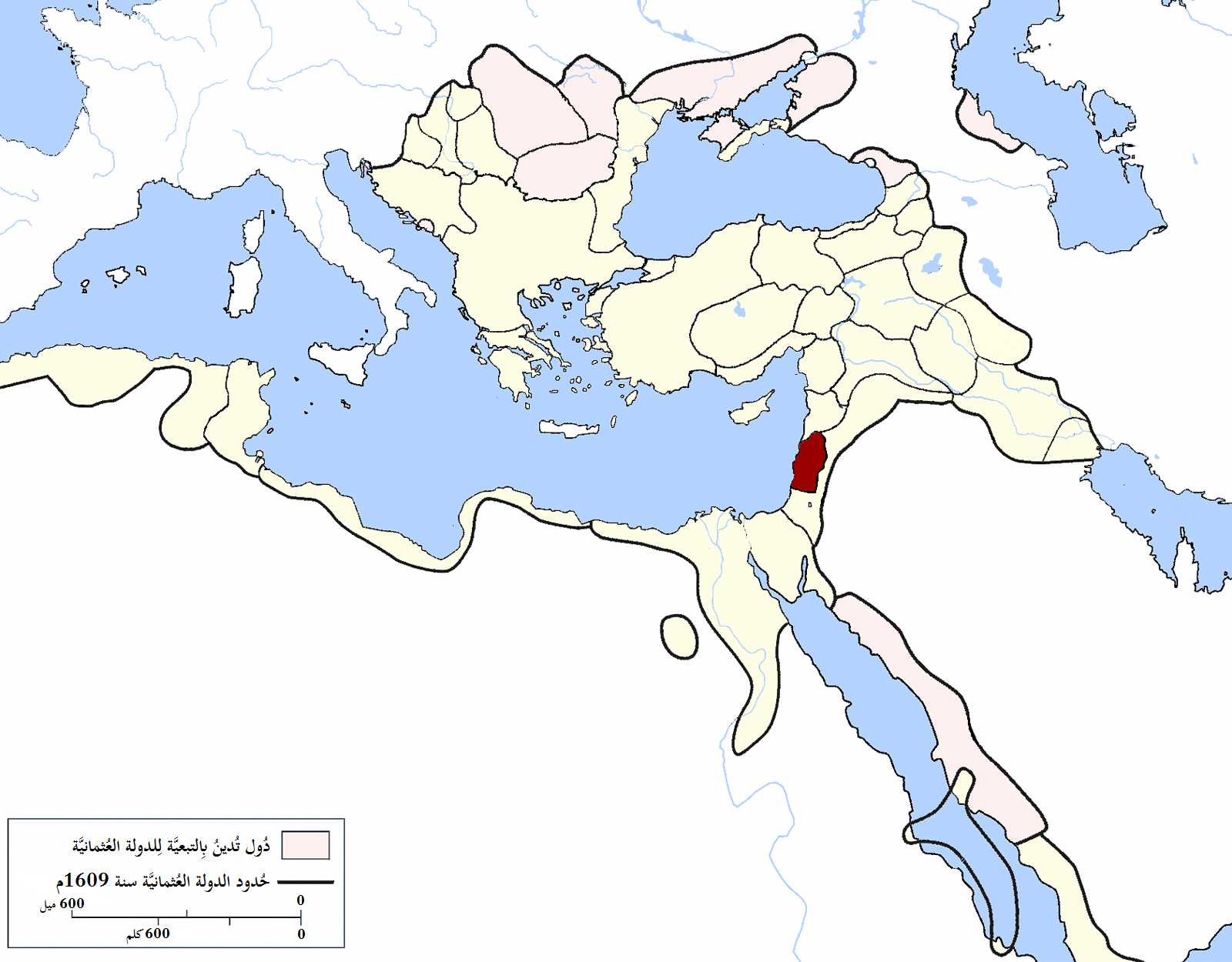 إيالة صيدا بِالدولة العُثمانيَّة سنة 1660م